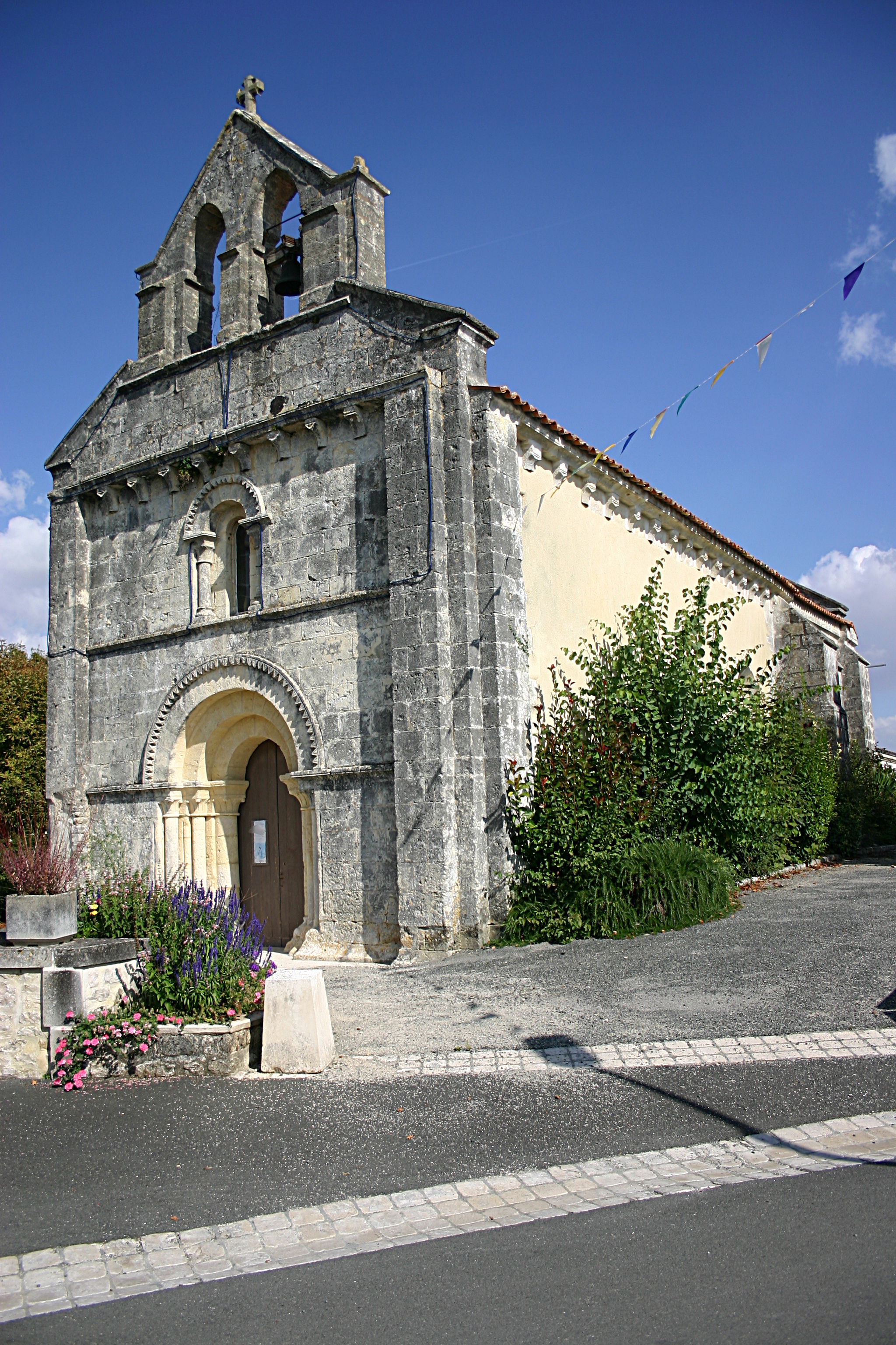 Église de Voissay (Charente-Maritime)